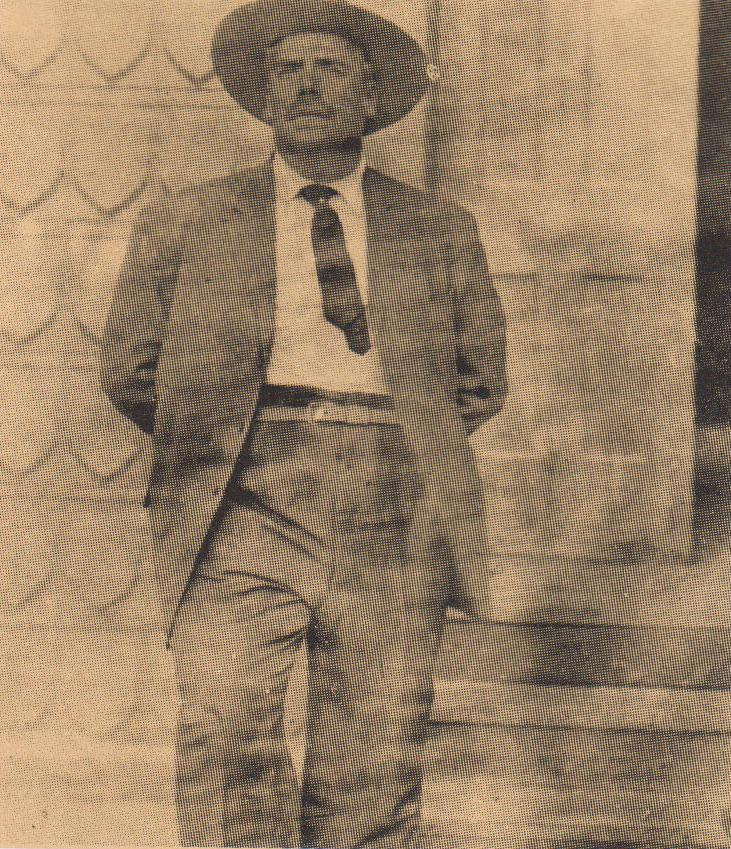 General José de la Luz Blanco